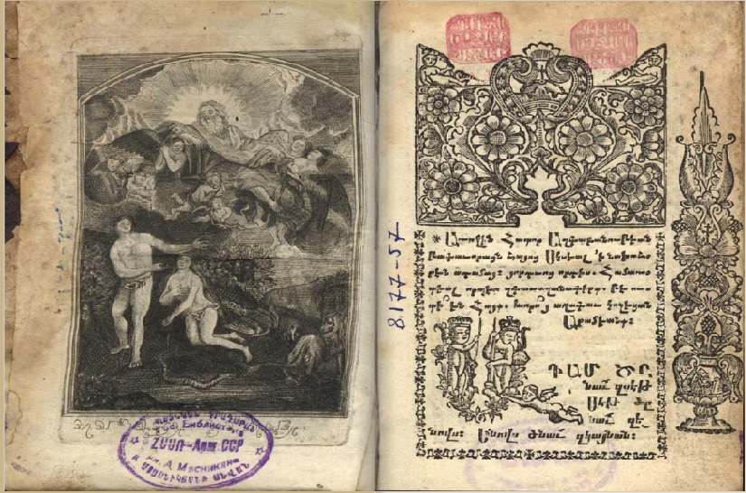 страница из труда Минаса Амдеци, издание 1735 года